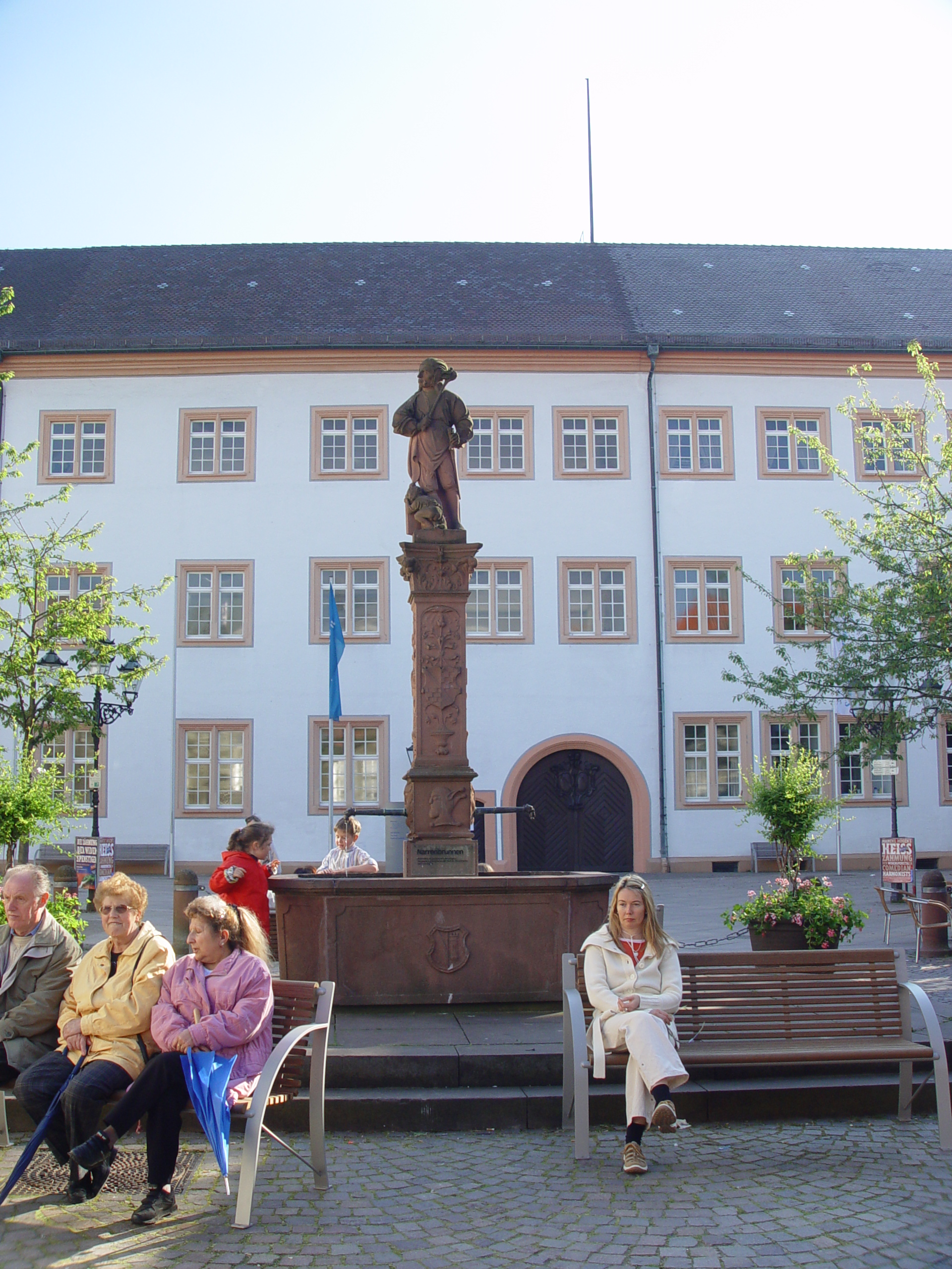 Fotografiert von Martin Dürrschnabel. Narrenbrunnen in Ettlingen.